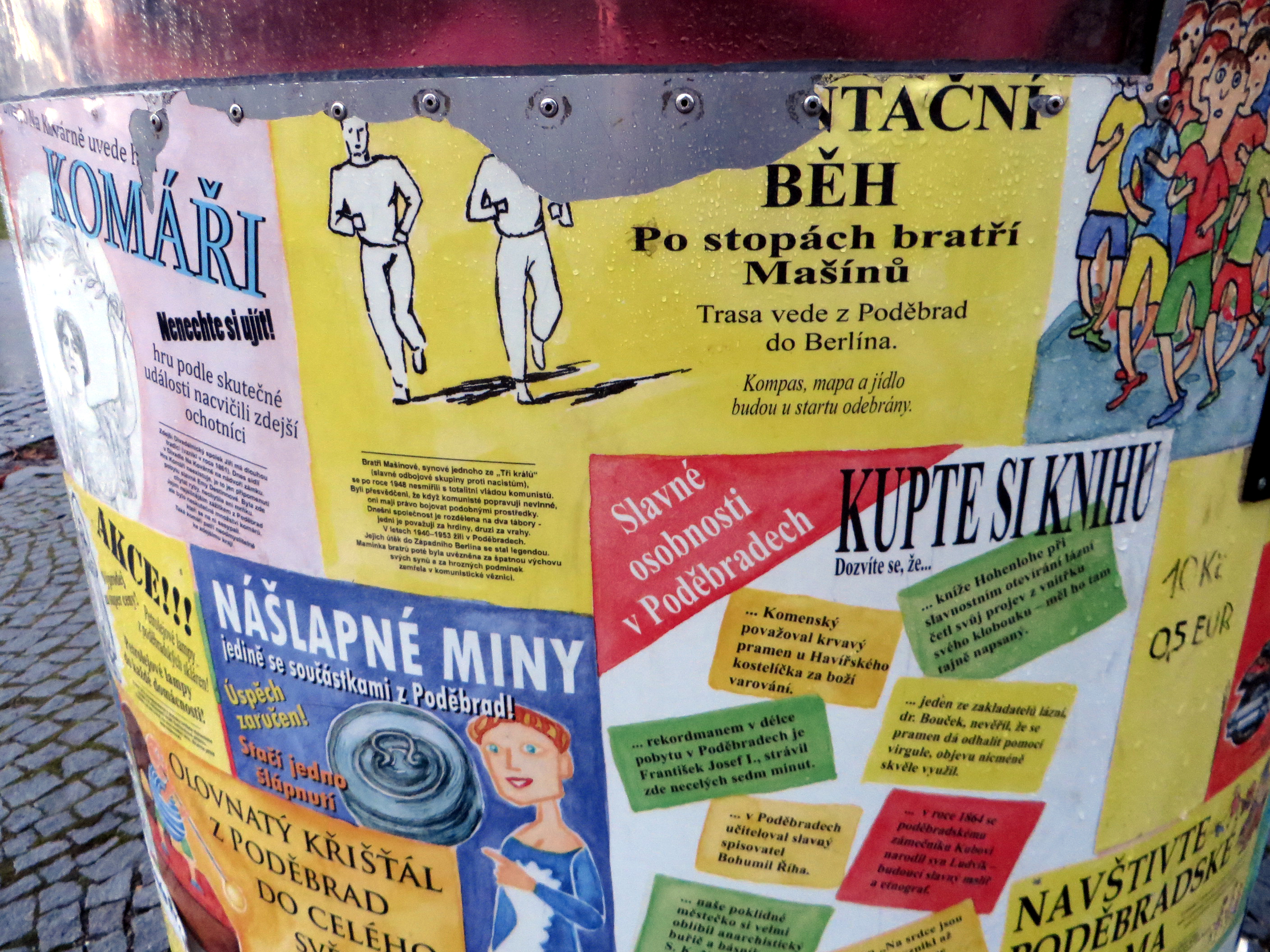 Poděbradské dioráma - bratři Mašínové.